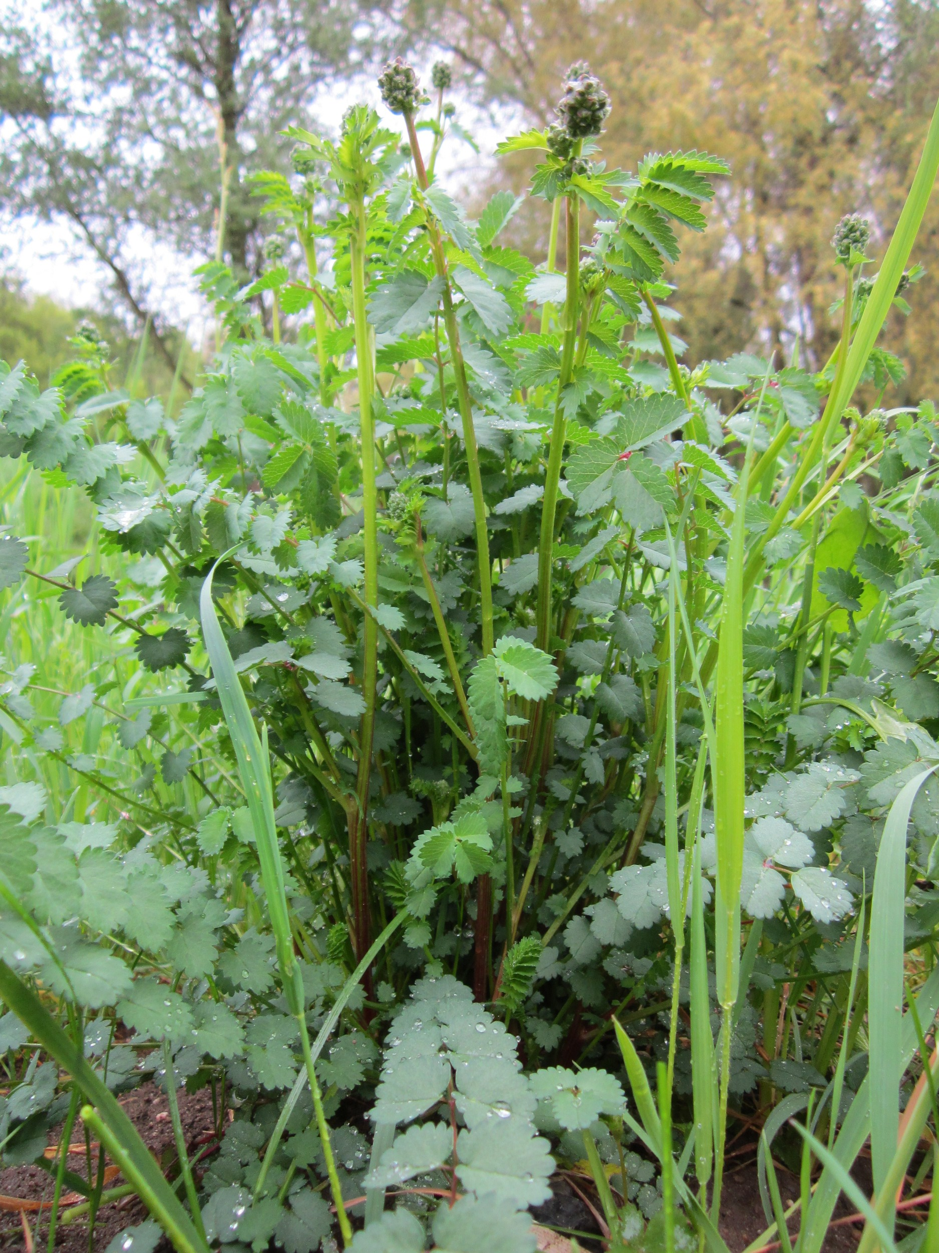 Kleiner Wiesenknopf (Sanguisorba minor) im Landesgartenschaupark Hockenheim